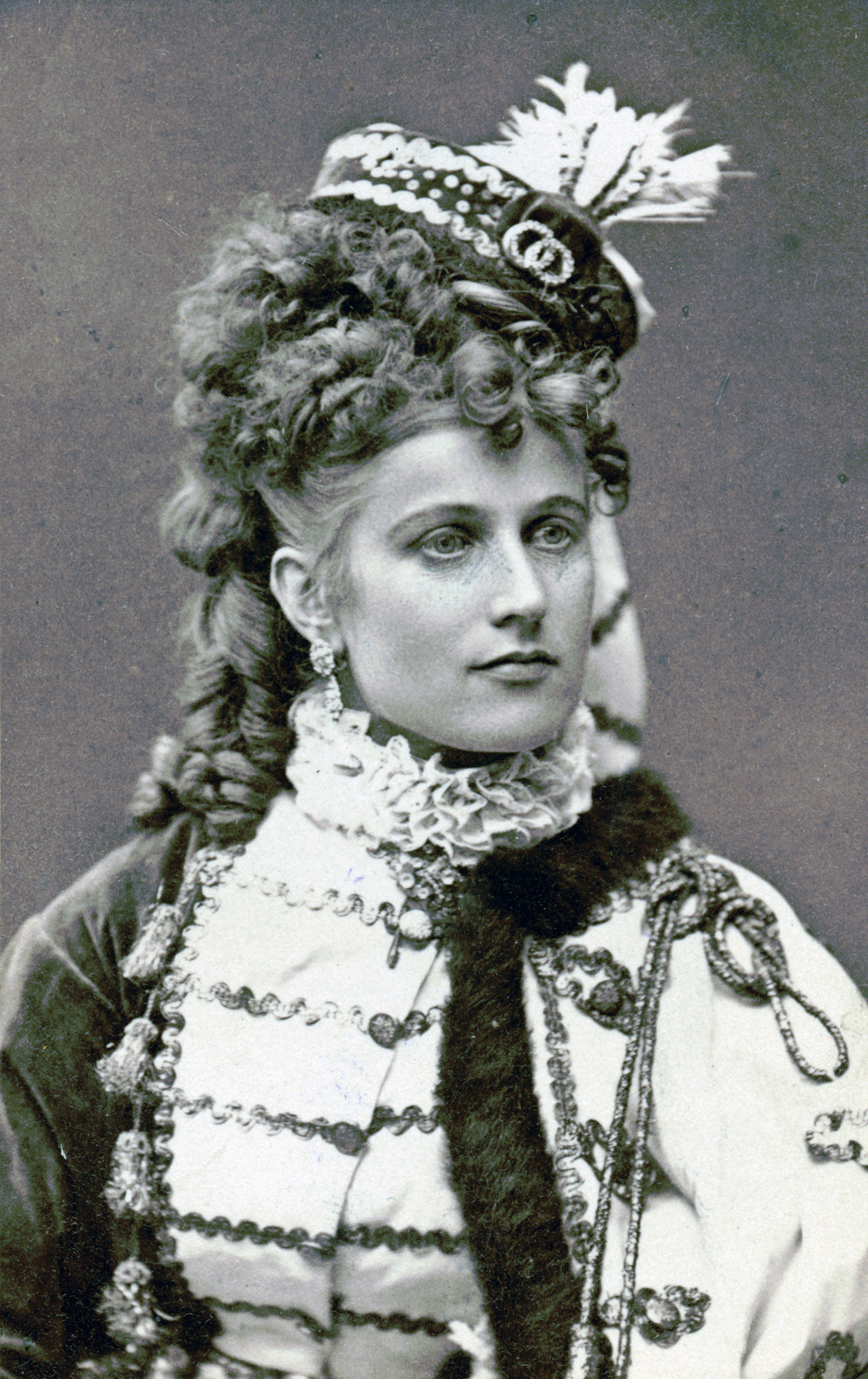 Charlotte Bergström i titelrollen i Storhertiginnan af Gerolstein, Södra teatern 1867